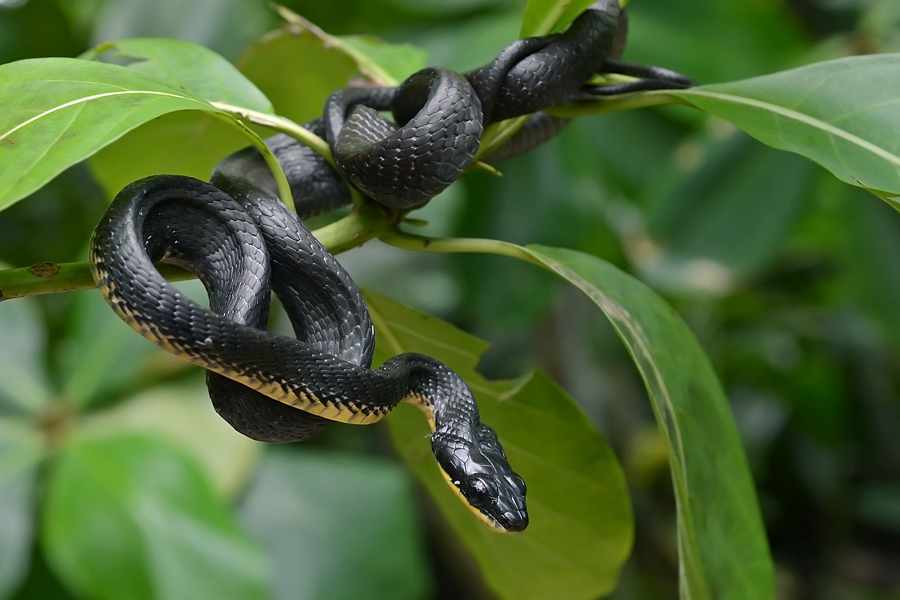 Colubridae: Pseustes poecilonotus Isla Colón, Bocas del Toro, Panama